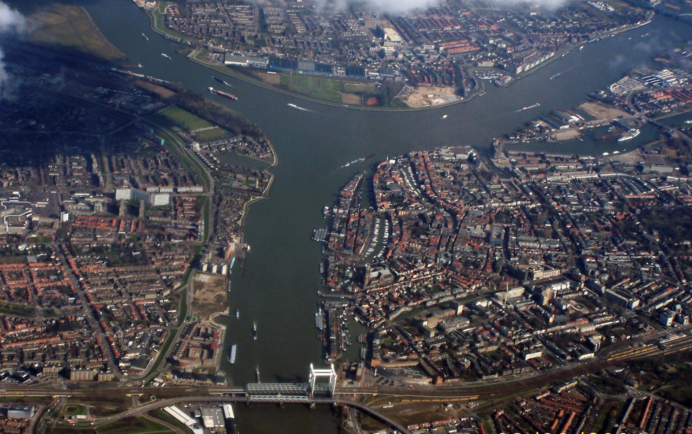 Dordrecht vanuit de lucht. Links Zwijndrecht, boven Papendrecht.